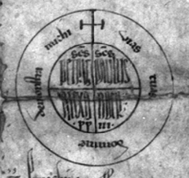 Rota sul privilegio di papa Alessandro III per San Salvatore di Messina 1175